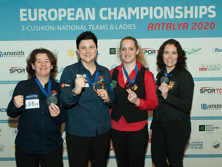 Die Siegerinnen:v.l. Karina Jetten (NLD), Therese Klompenhouwer (NLD), Estela Cordoso (ESP), Jaimie Buelens (BEL)